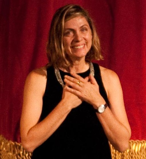 A atriz e cineasta Carla Camurati, na festa de reinauguração do Teatro Municipal do Rio de Janeiro.